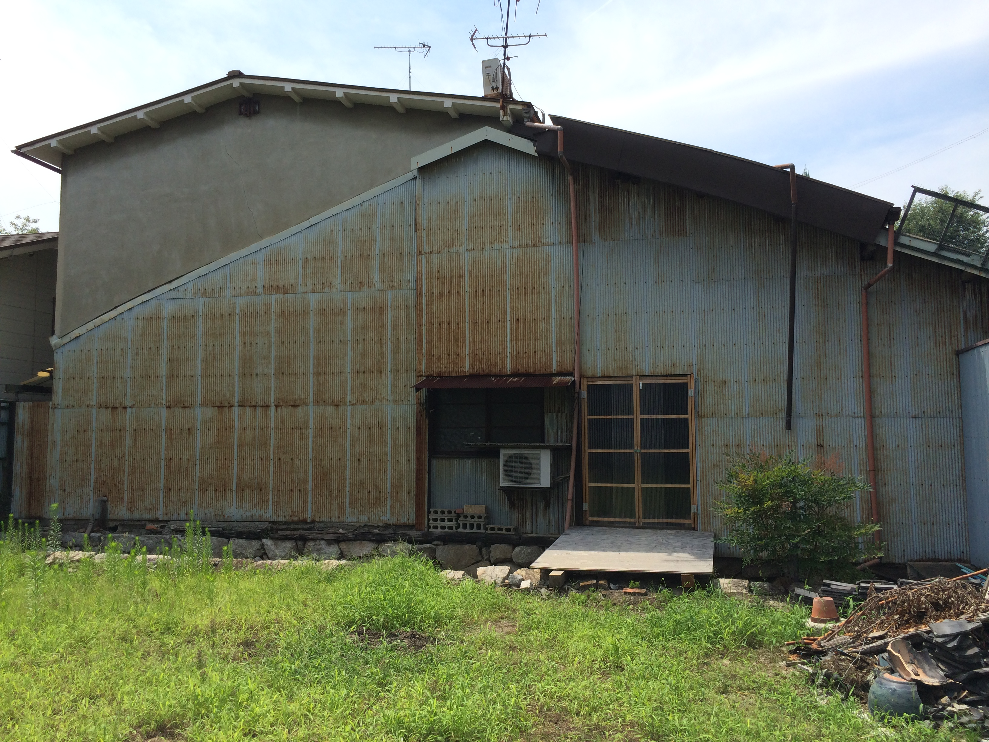 大正期、竹中亀吉によって経営されていた竹中製麦所の跡地（手前の広場）。 直径4mの大水車が設置され、その水力で精麦が行われていた。